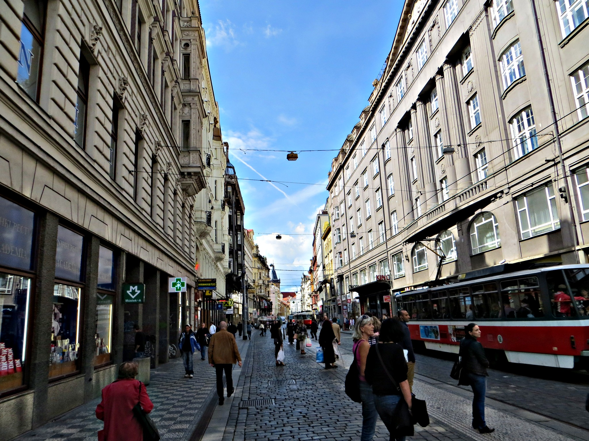 Vodičkova